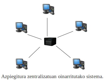 P2P sistema egituratuaren eskema